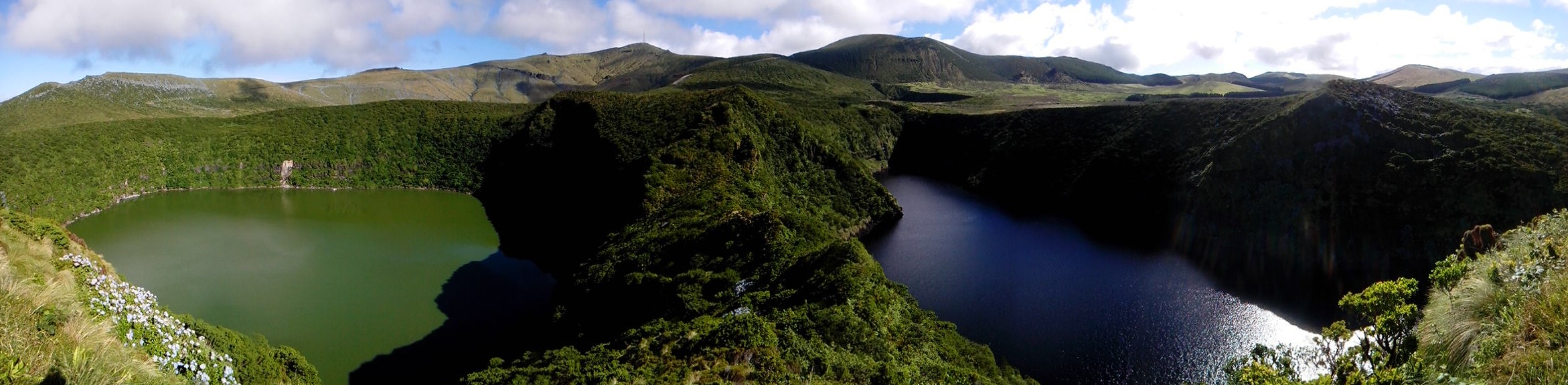 Interior da ilha das Flores, Lagoa Negra e Lagoa Comprida, ilha das flores, Açores, Arquivo de Villa Maria, ilha Terceira, Açores